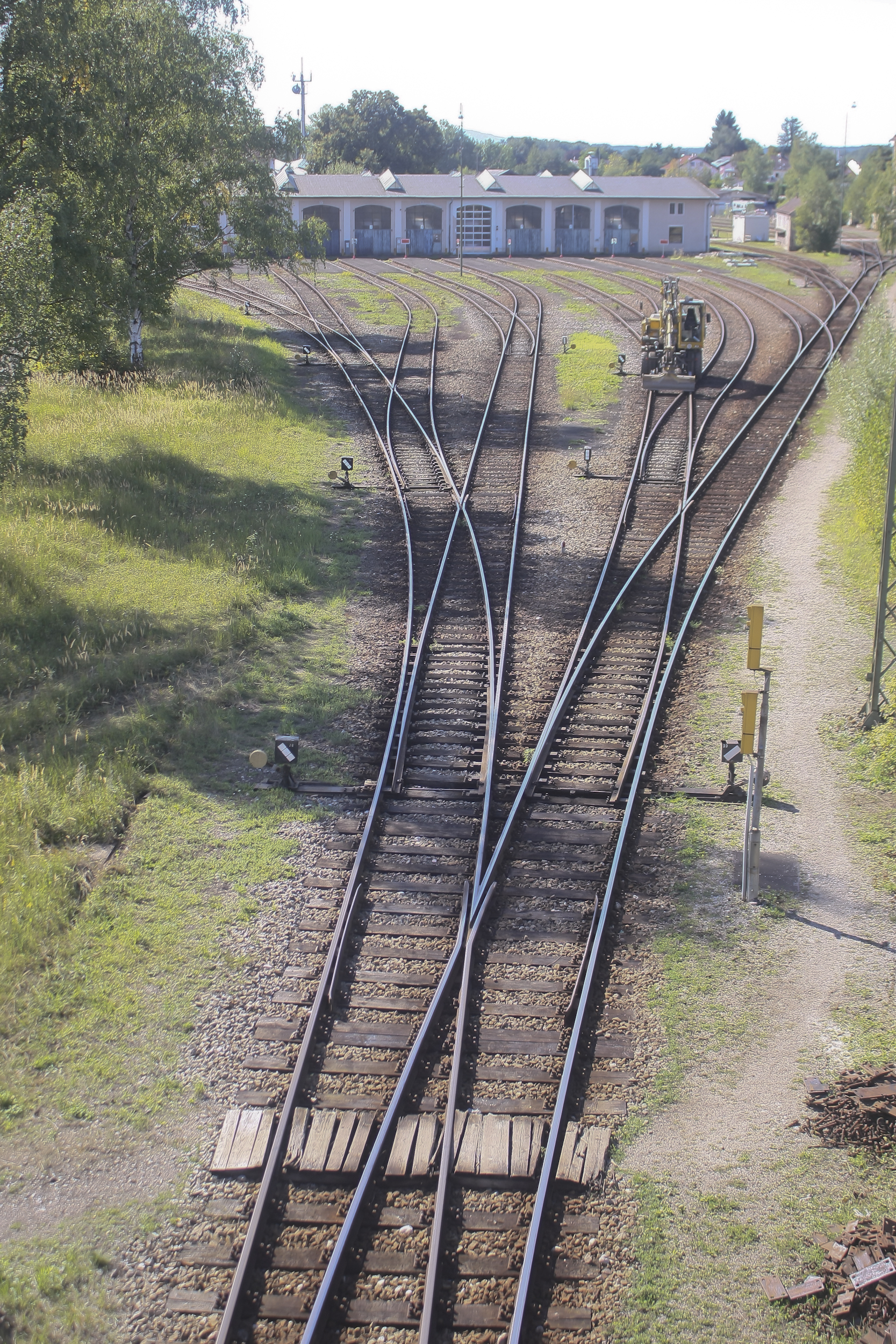 Bahnbetriebswerk, Betriebs- und Reparaturwerkstätte westlich des Bahnhofs mit Anschluß zur Hauptstrecke Rosenheim-Salzburg, im wesentlichen 1902-07 errichtet (Inbetriebnahme 1905) und 1924-26 im Zusammenhang mit der Elektrifizierung des Zugverkehrs erweitert, bestehend aus: Wagenrichthalle, Rechteckhalle mit parallelen Gleisständen, Kernbau 1902-05, in gleicher Bauweise gemäß urspr. Konzeption 1925/26 nach Norden und Osten erweitert; angeschlossen ehem. Radsatz-Werkstätte (Dreherei) mit Magazingebäude, 1902-05; Verwaltungs- und Übernachtungsgebäude, freistehender dreigeschossiger Satteldachbau, 1902-05; Halbrundschuppen für Triebfahrzeuge mit 20 Radialgleisen, 1902-05, mit Gelenk-Drehscheibe von 1923 (bez.) und Oberleitungsspinne; Ellok-Werkstatt, sog. Groß- und Kleinmontierhalle, in Eisenbetonkonstruktion, und Verbindungsbau zum Rundschuppen, 1924-26; mit zugehörigen Gleis- und Wartungsanlagen. This is a photograph of an architectural monument.